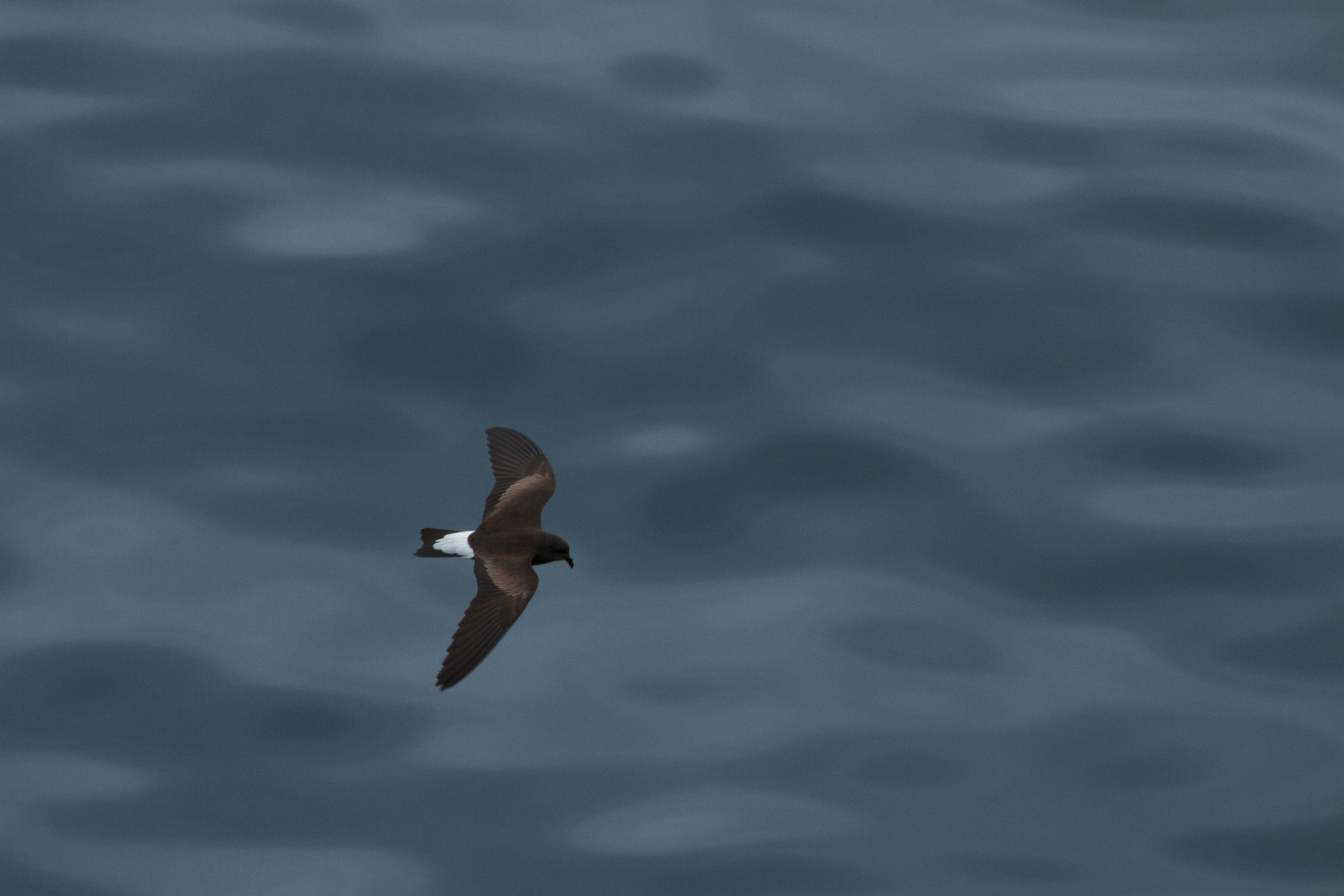 Oceanodroma tethys